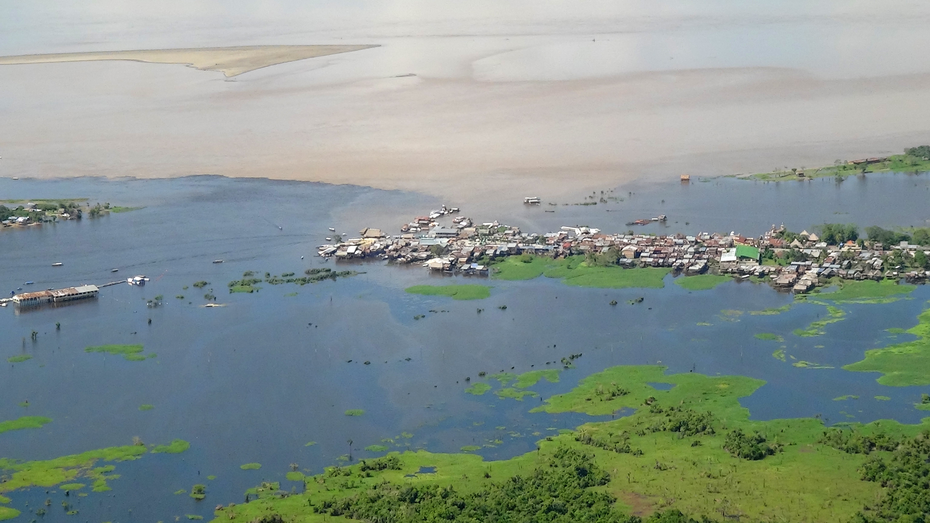 Bellavista-Nanay en medio de la desembocadura del Río Nanay con el Río Amazonas